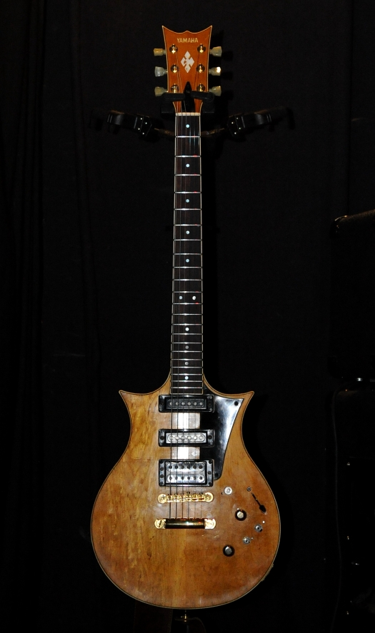 Jinete Nocturno Live @ La Mala - 09.06.2012